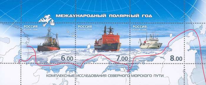 3 марки. Марки изданы сцепкой в листе с оформленными полями. 2008